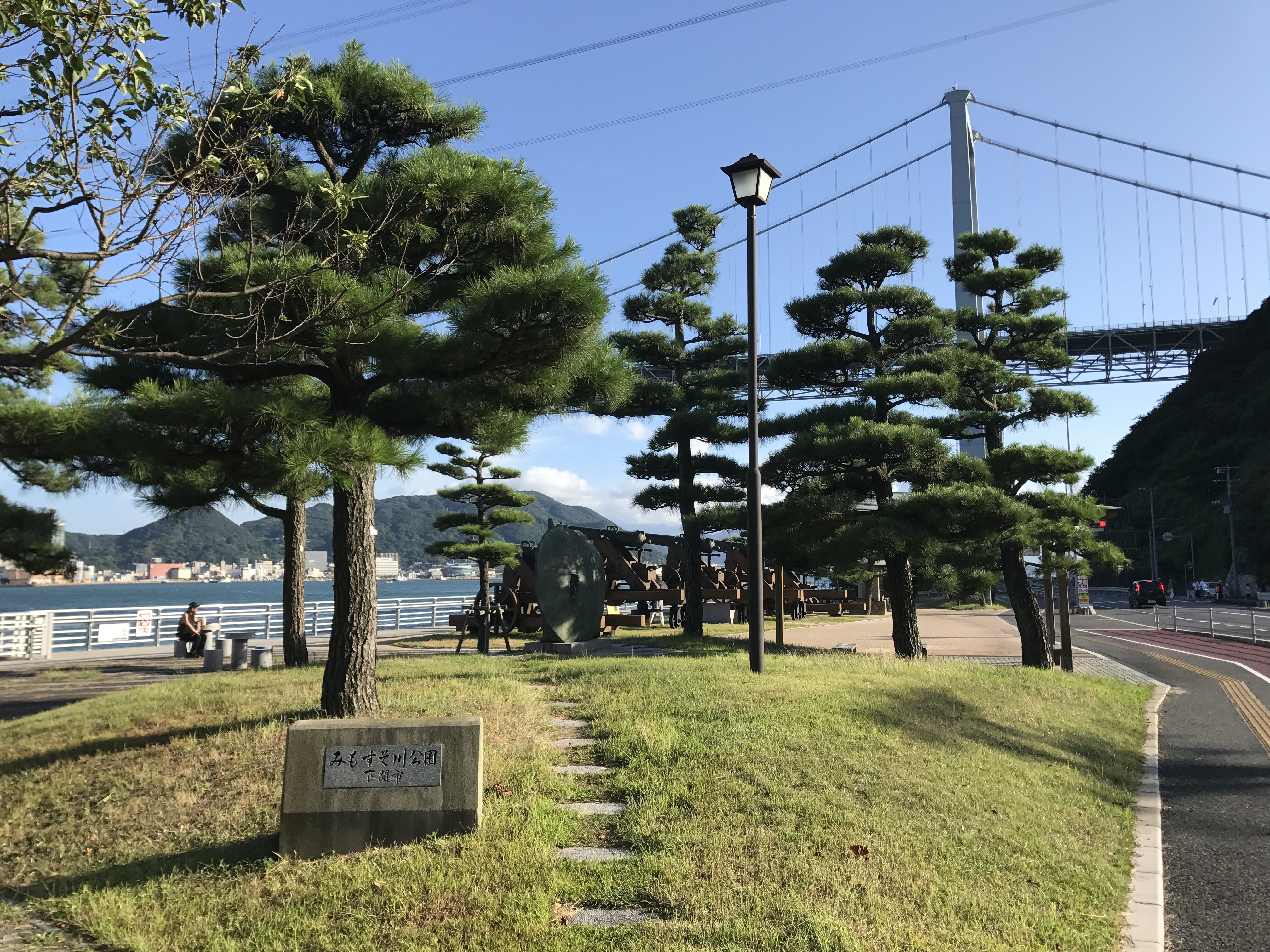 みもすそ川公園